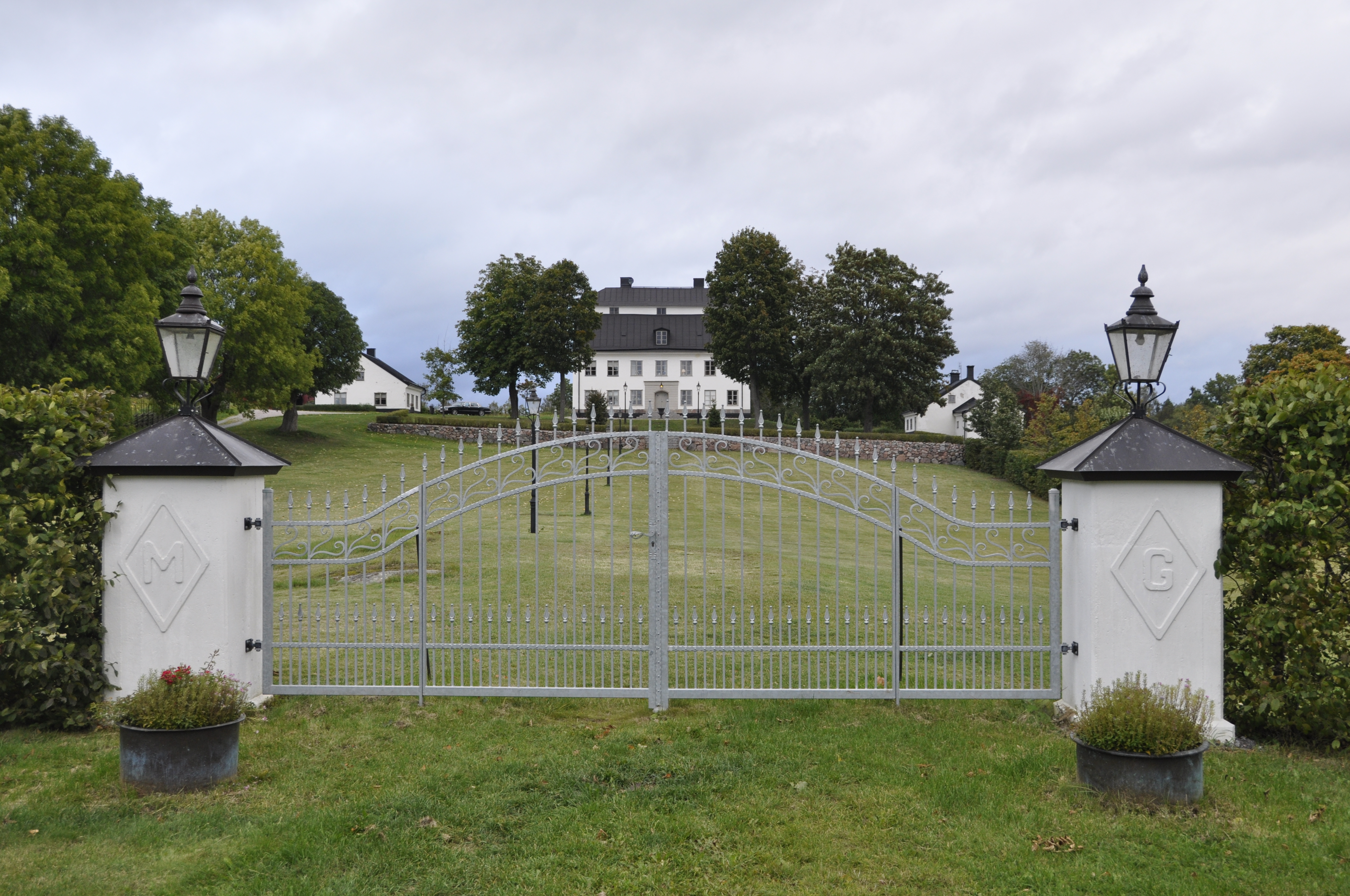 Marums gård, Ljusterö, Österåkers kommun. Huvudbyggnaden med flygelbyggnader.